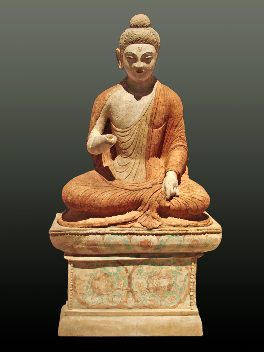 Bouddha Le premier sermon à Sarnath Shorchuk, grotte de Kirin, 8ème siècle (?). Site archéologique sur la Route de la Soie par le nord, à environ 300 km au sud-ouest d'Urumqi, Xinjiang. Argile peinte musée des arts asiatiques (Dahlem, Berlin) Sârnâth est une cité bouddhiste se trouvant à une dizaine de kilomètres au nord de Vârânasî dans l'état indien de l'Uttar Pradesh. C'est le lieu du premier sermon du Bouddha.